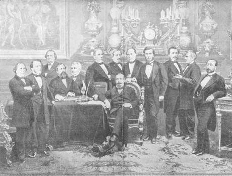 1870 napoleon III